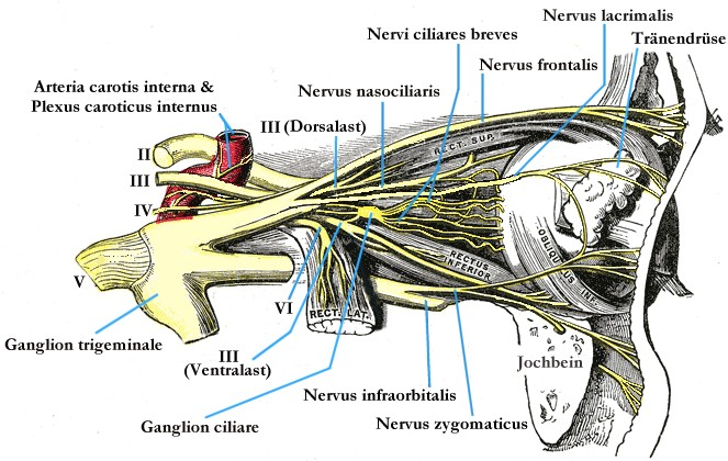 Nerven der Augengegend (II=Nervus opticus, III=Nervus oculomotorius, IV=Nervus trochlearis, V=Nervus trigeminus, VI=Nervus abducens); Image:Gray777.png etwas modifiziert von Benutzer:Uwe Gille